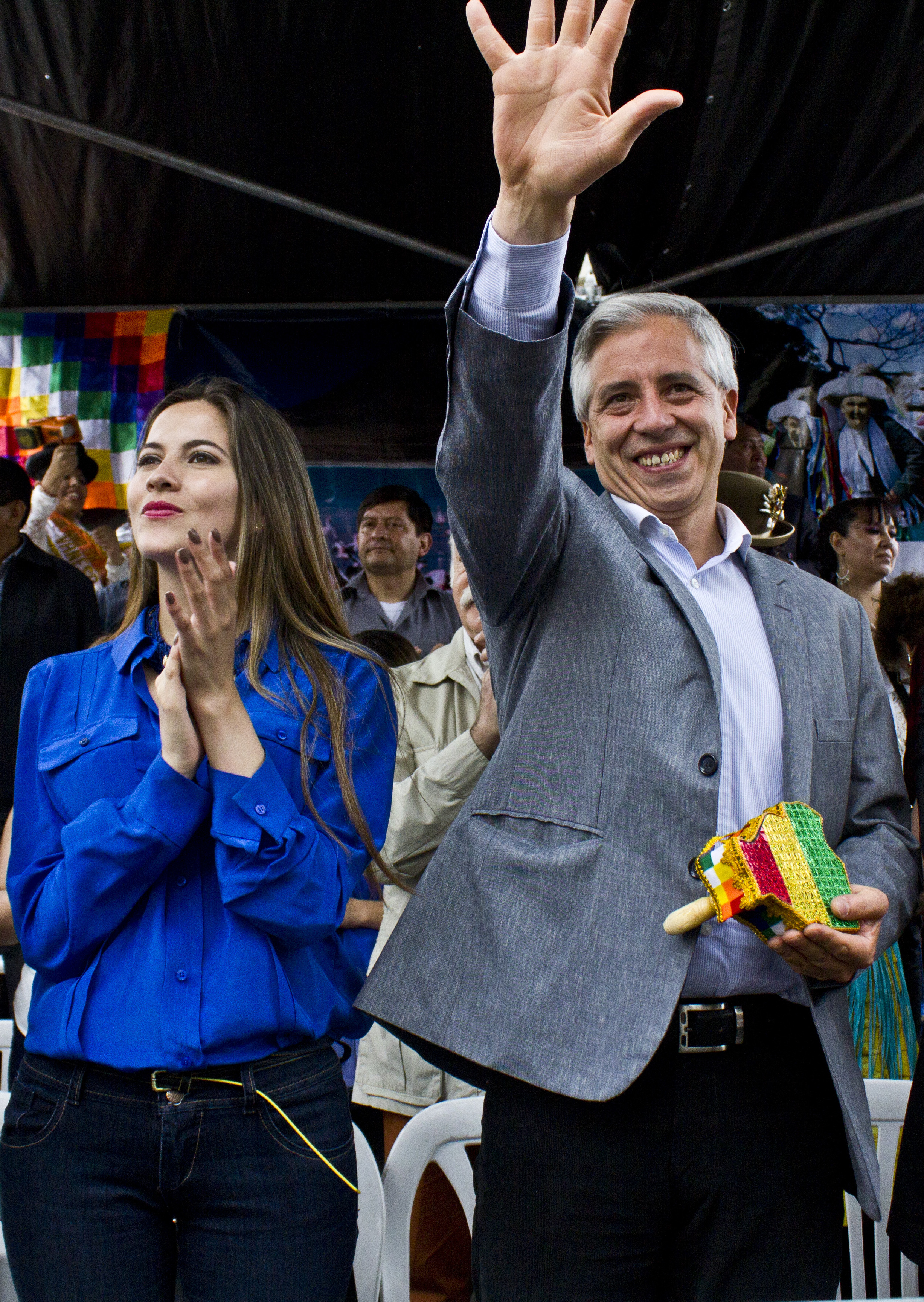 Buenos Aires, 18 de octubre de 2014 - La ministra de Cultura de la Nación, Teresa Parodi, el vicepresidente de Bolivia, Álvaro García Linera y el secretario General de la Presidencia de la Nación, Oscar Parrilli asistieron al tradicional desfile por la Integración Cultural Latinoamericana, que se llevó a cabo en el centro porteño. Se trata de la celebración cultural más importante de la comunidad boliviana en la Argentina, en la que se rinde homenaje a la Virgen de Copacabana, patrona de la colectividad. Fotos: Mauro Rico/ Ministerio de Cultura de la Nación.